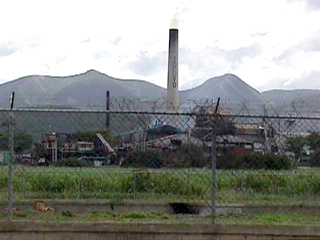 Central El Tocuyo, estado Lara - Venezuela (1999)